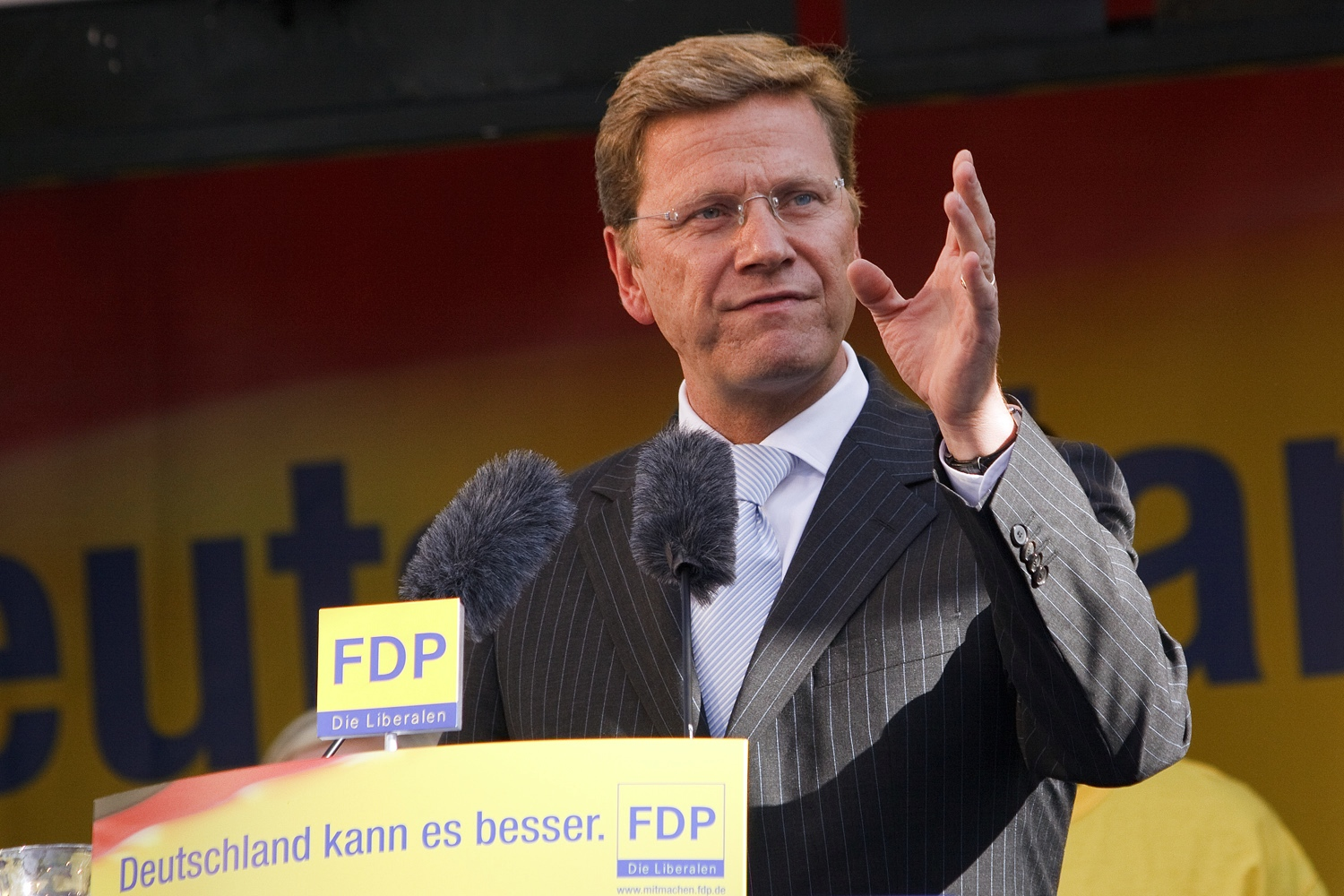 FDP-Chef Guido Westerwelle während einer Wahlkampfveranstaltung in Hamm